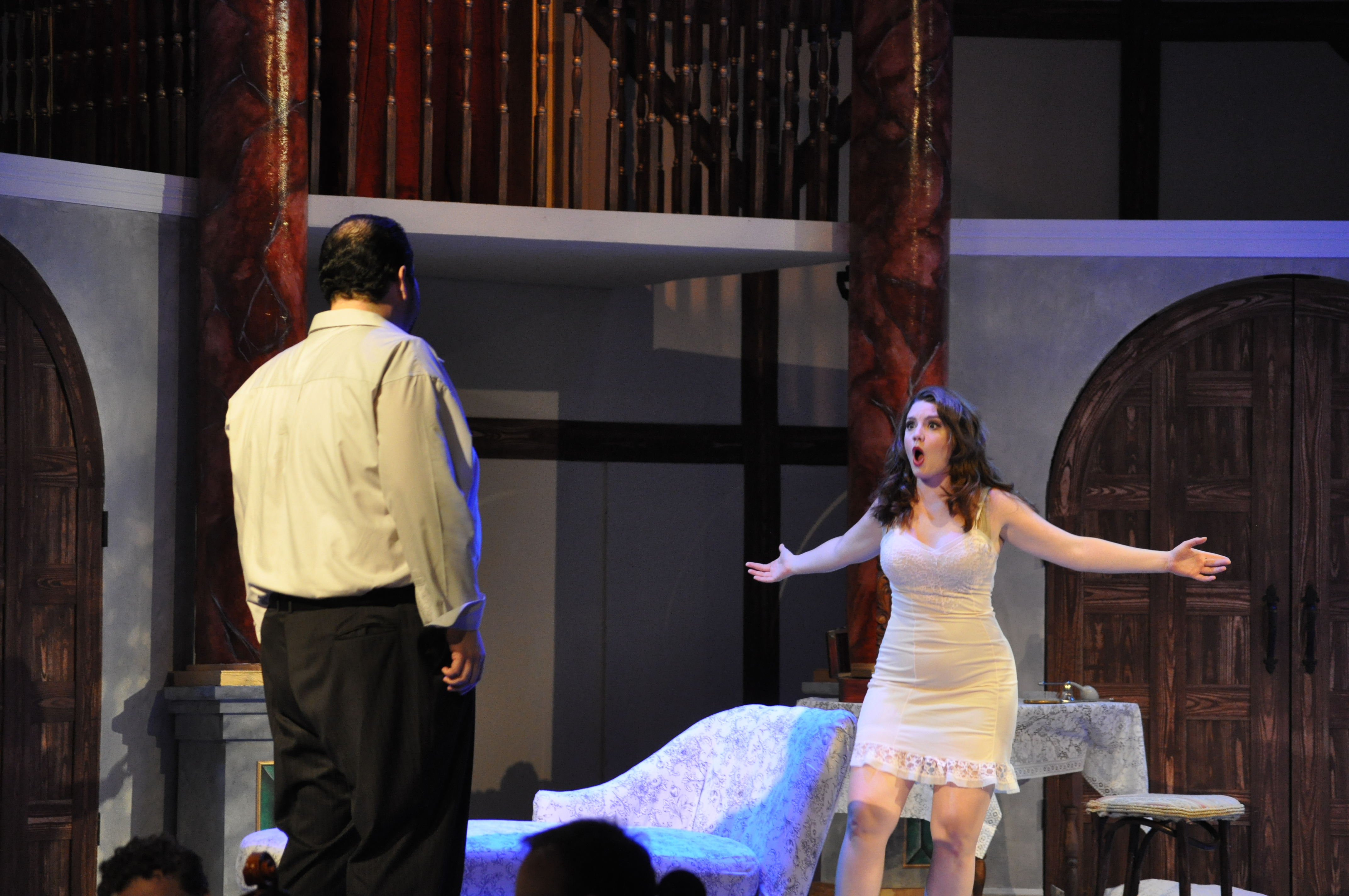 DSC_0443 oih